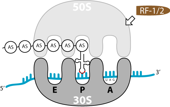 Termination der Translation Thumbnail